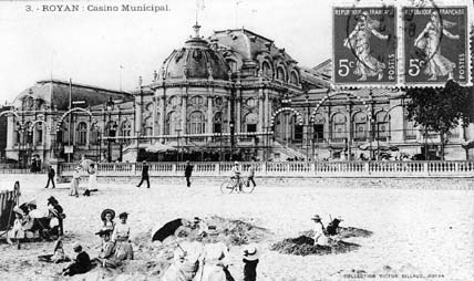 Le casino municipal de Royan, construit en 1895, détruit en 1945